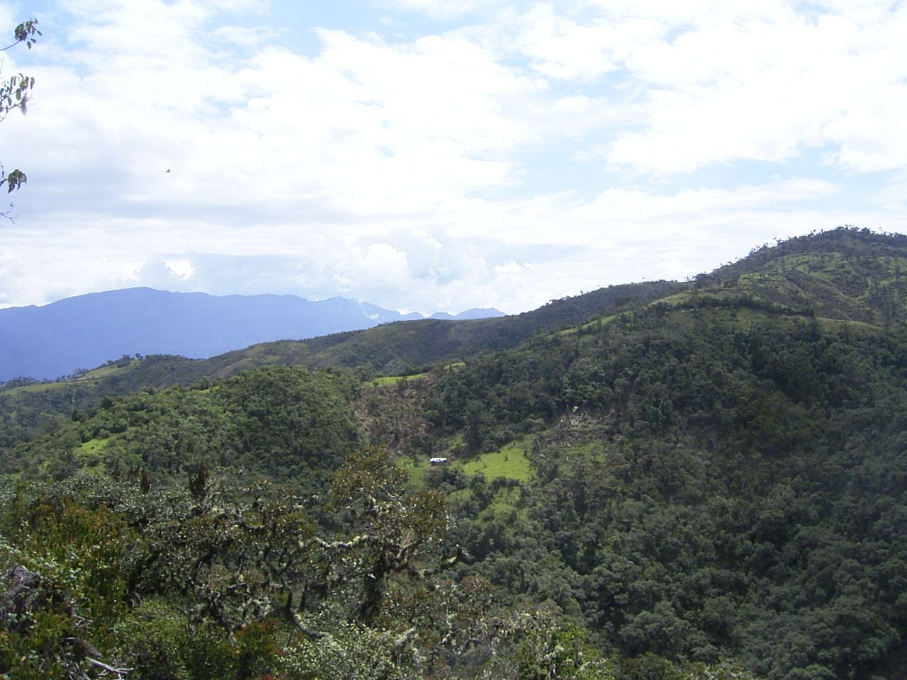 paisaje en el Distrito de Soloco, Provincia de Chachapoyas, Amazonas, Peru.